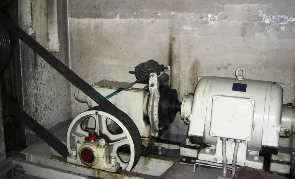 42 PS Motor eines Lastenaufzugs